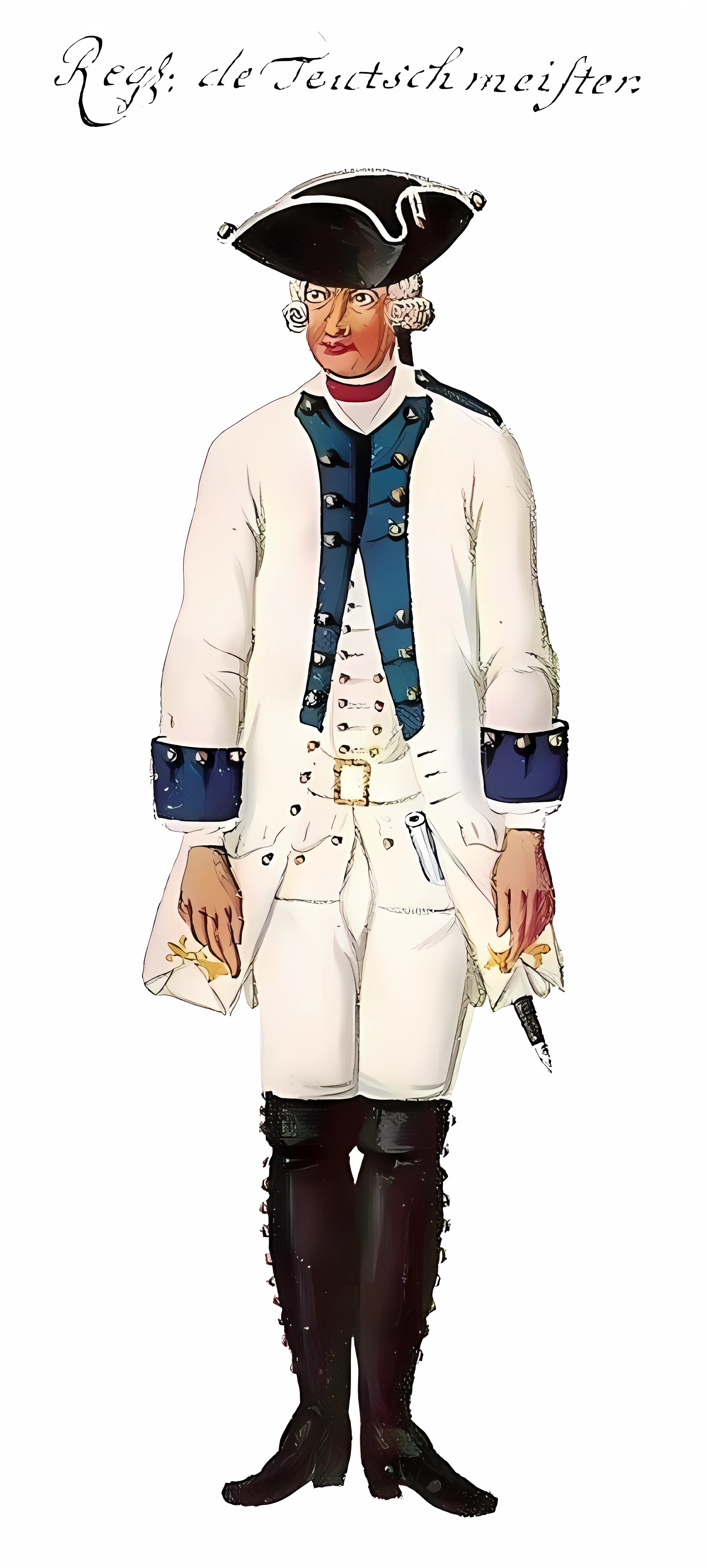 Kaiserliches Infanterieregiment Teutschmeister 1762 (1769: No. 4)